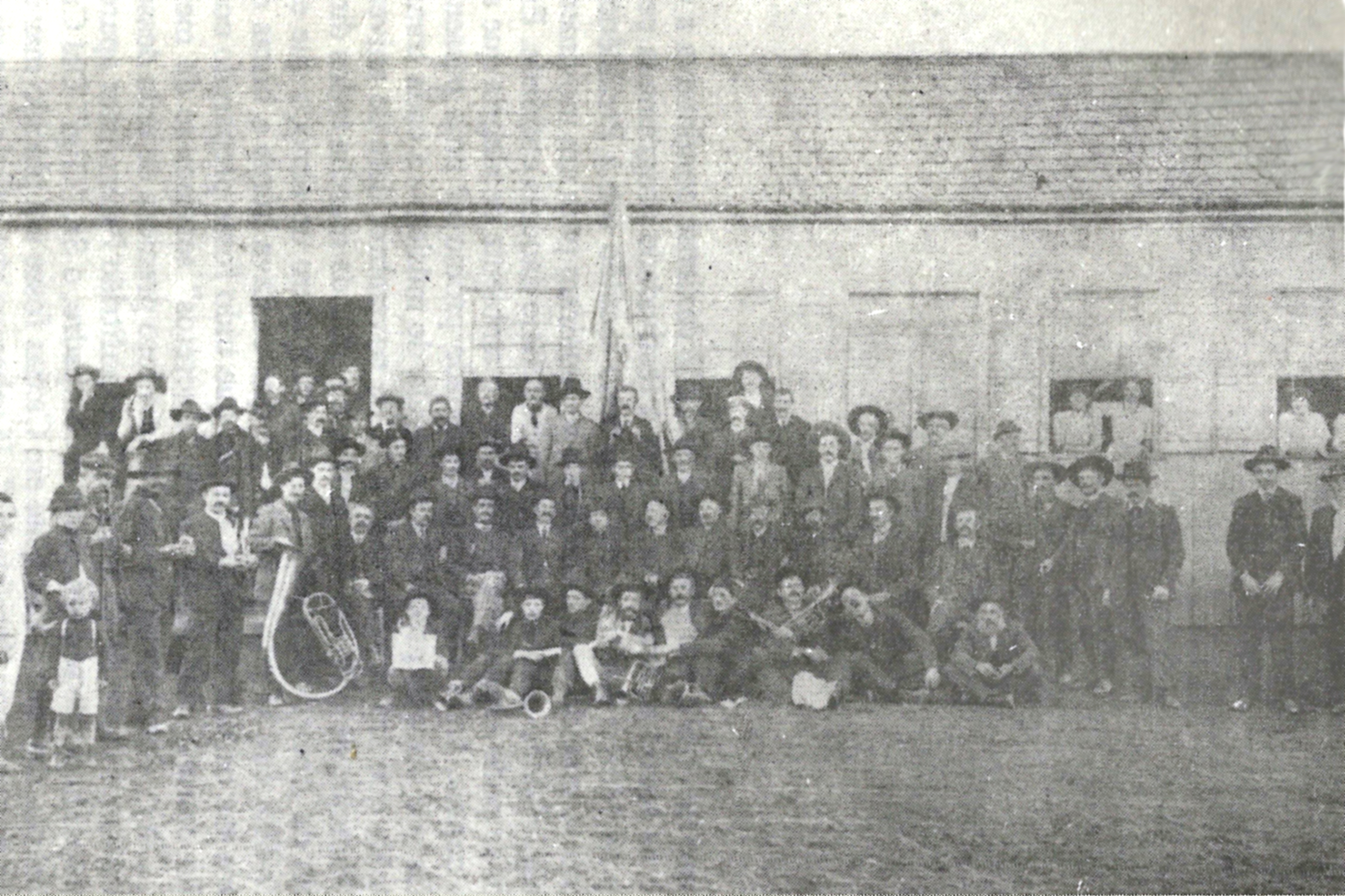 Grupo reunido em frente da casa e bodega de João Paternoster e sua família, em festa comemorando o 23º aniversário da Sociedade Príncipe de Nápoles. João Paternoster aparece na primeira janela à direita da porta, de camisa branca e lenço escuro no pescoço, ao lado de Luigi dal Canale. Seu filho Pery Paternoster é o menino de calças brancas na extrema esquerda. Possivelmente a mulher atrás dele seja sua mãe Marietina Sartori Paternoster.